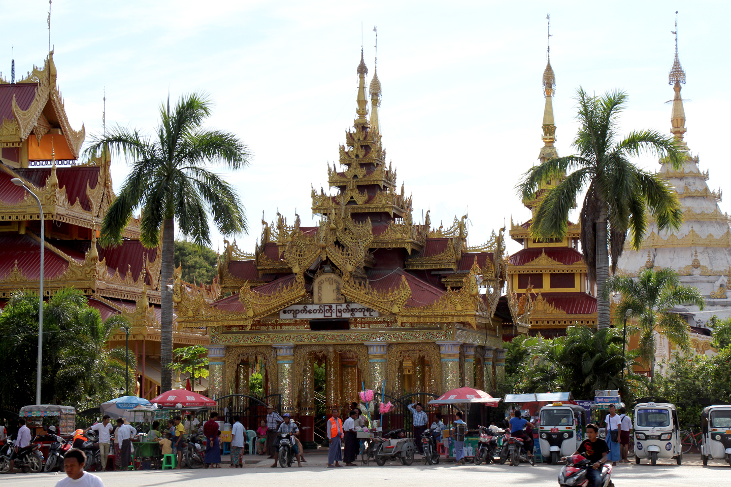 မြန်မာဘာသာ: မန္တလေးတောင်ခြေရှိ ကျောက်တော်ကြီးဘုရား(မန္တလေး) မုဒ်ဦး